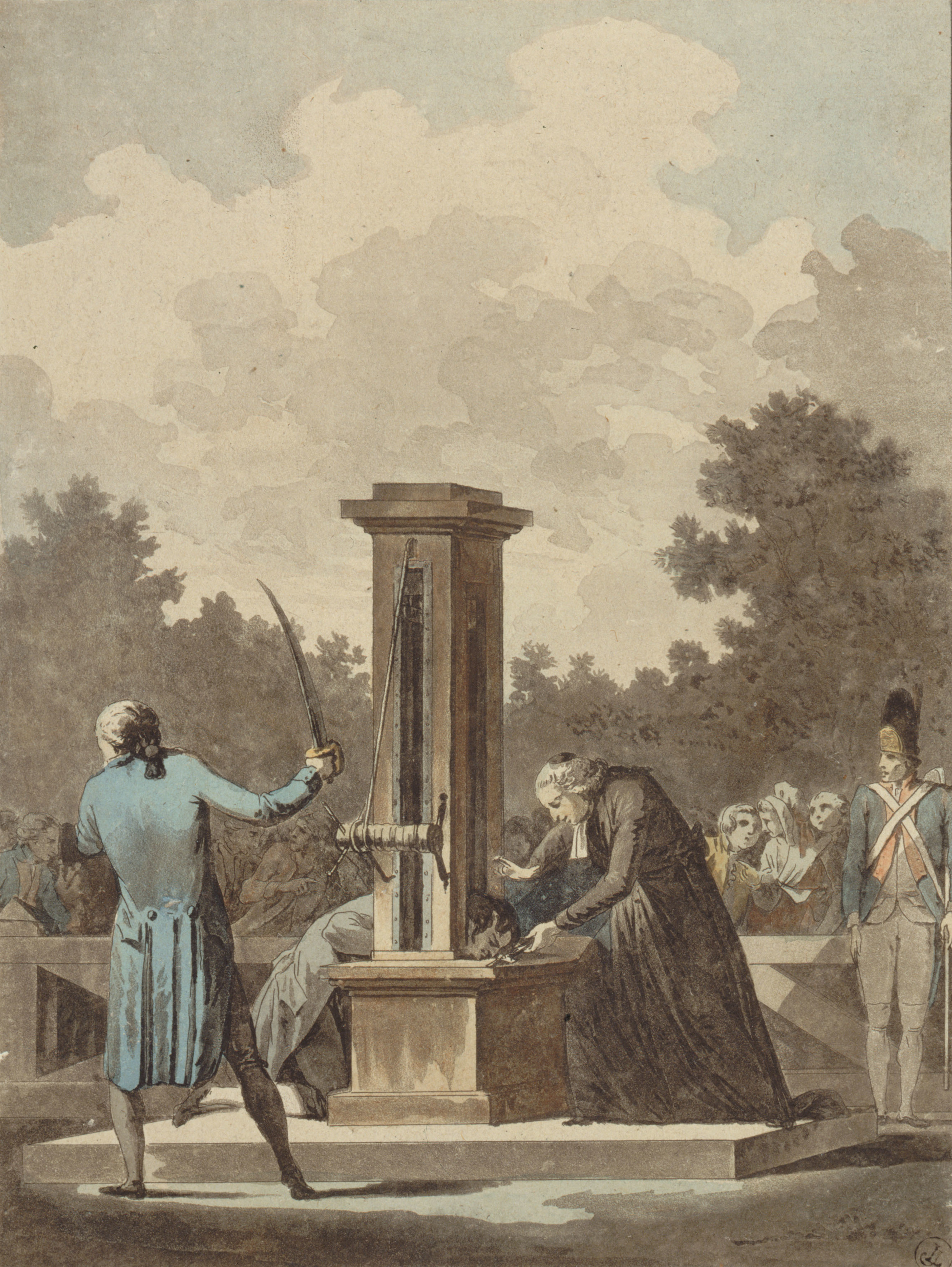 Machine proposée à l'Assemblée nationale pour le supplice des criminelles par M. Guillotin (estampe Musée Carnavalet, 22.9 x 15.3 cm)